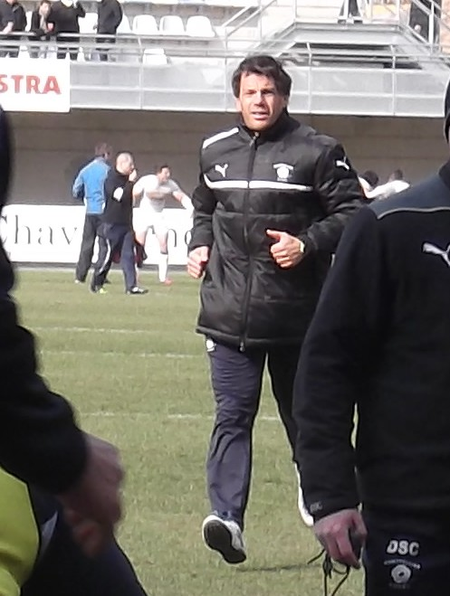 Stéphane Glas (match MHR contre Union Bordeaux-Bègles).